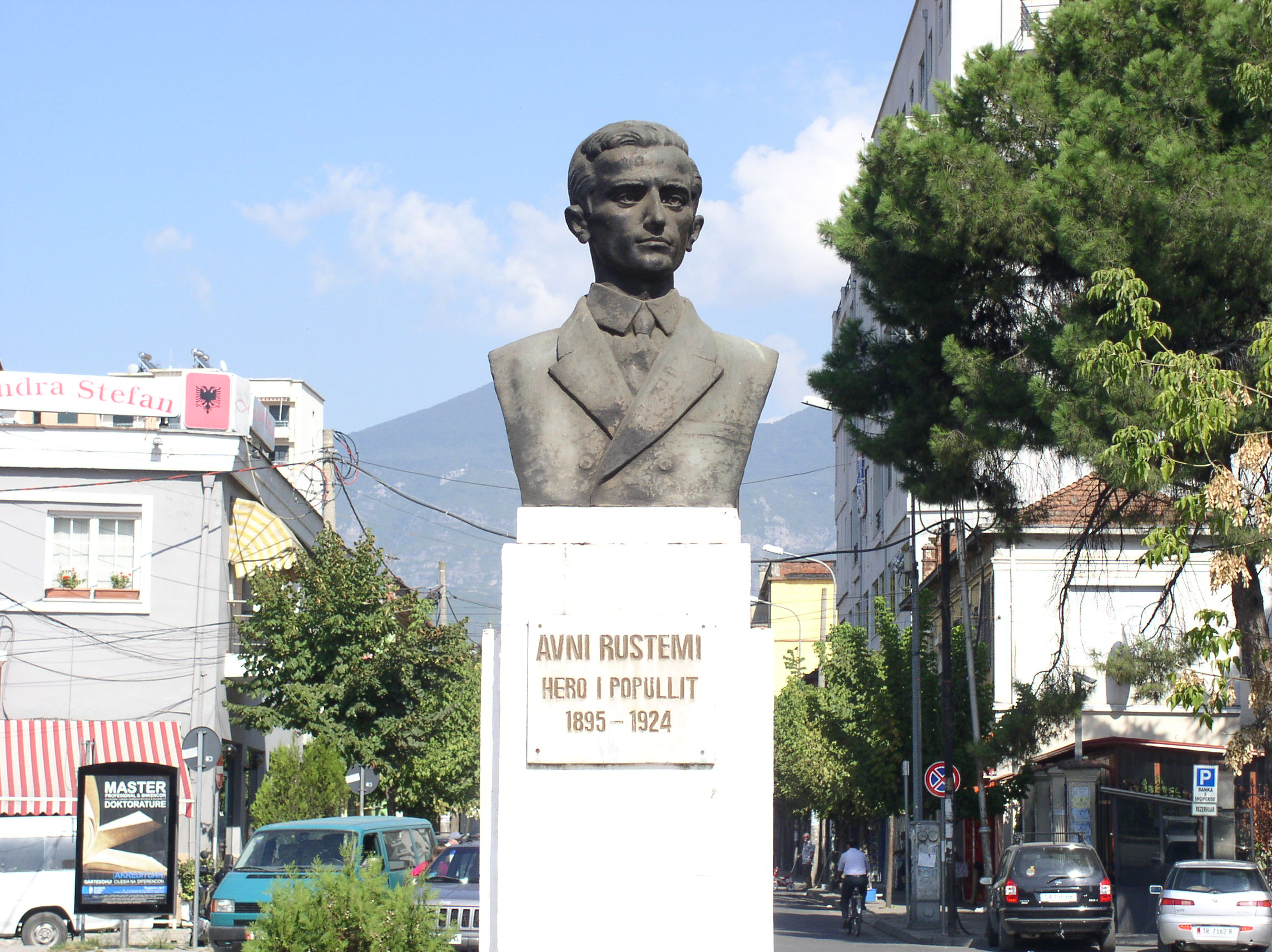 monument of Avni Rustemi